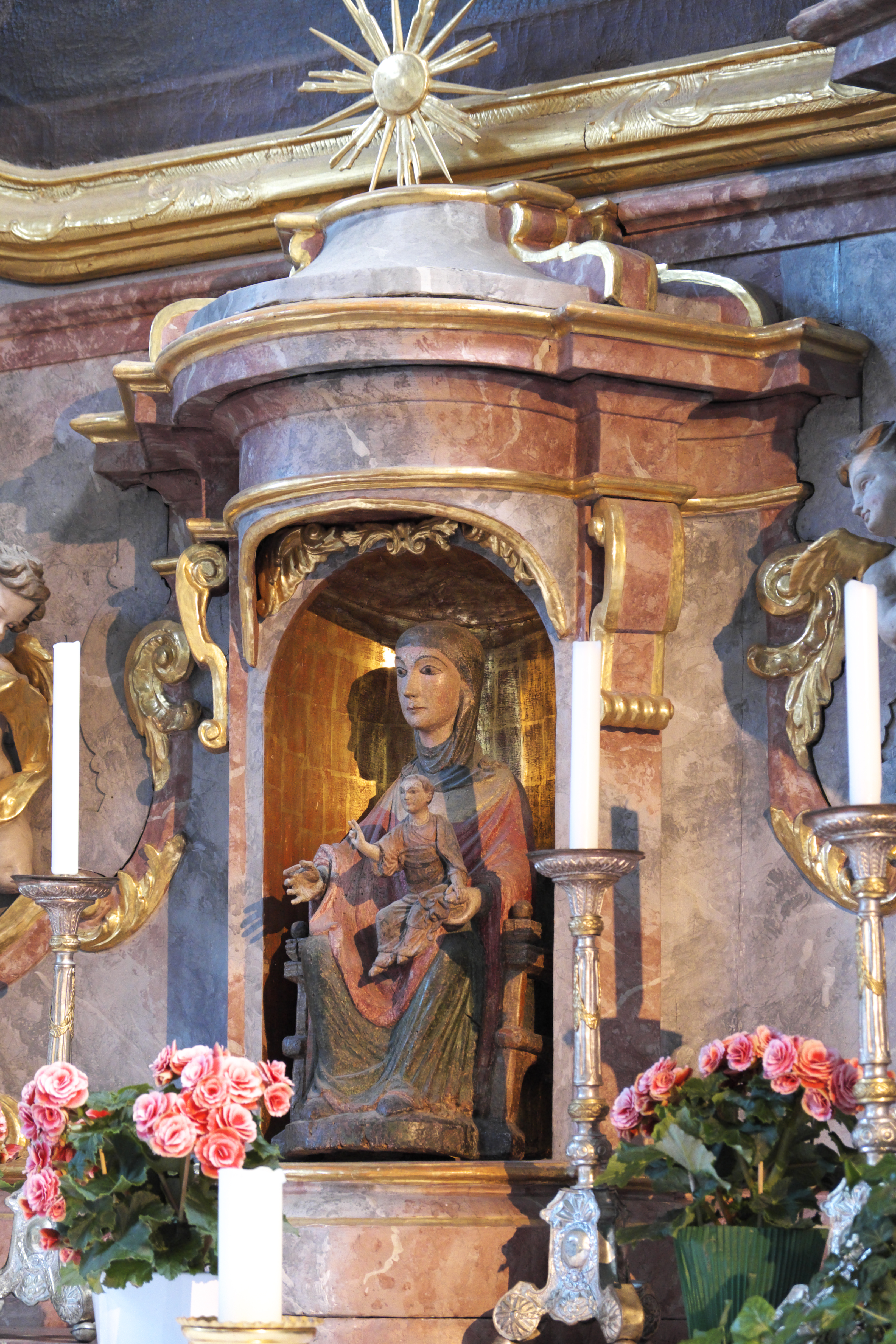 Katholische Pfarrkirche St. Georg in Ruhpolding im Landkreis Traunstein (Bayern/Deutschland), Ruhpoldinger Madonna von 1220/30